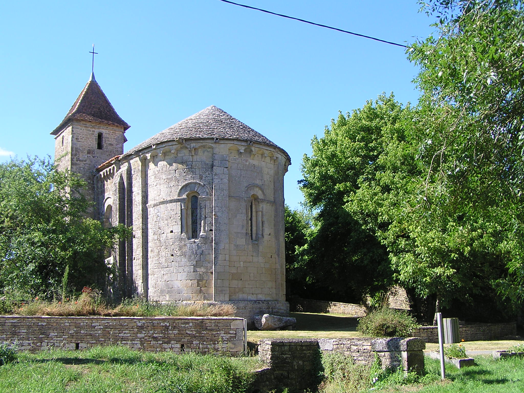 église d'Empuré, Charente, France